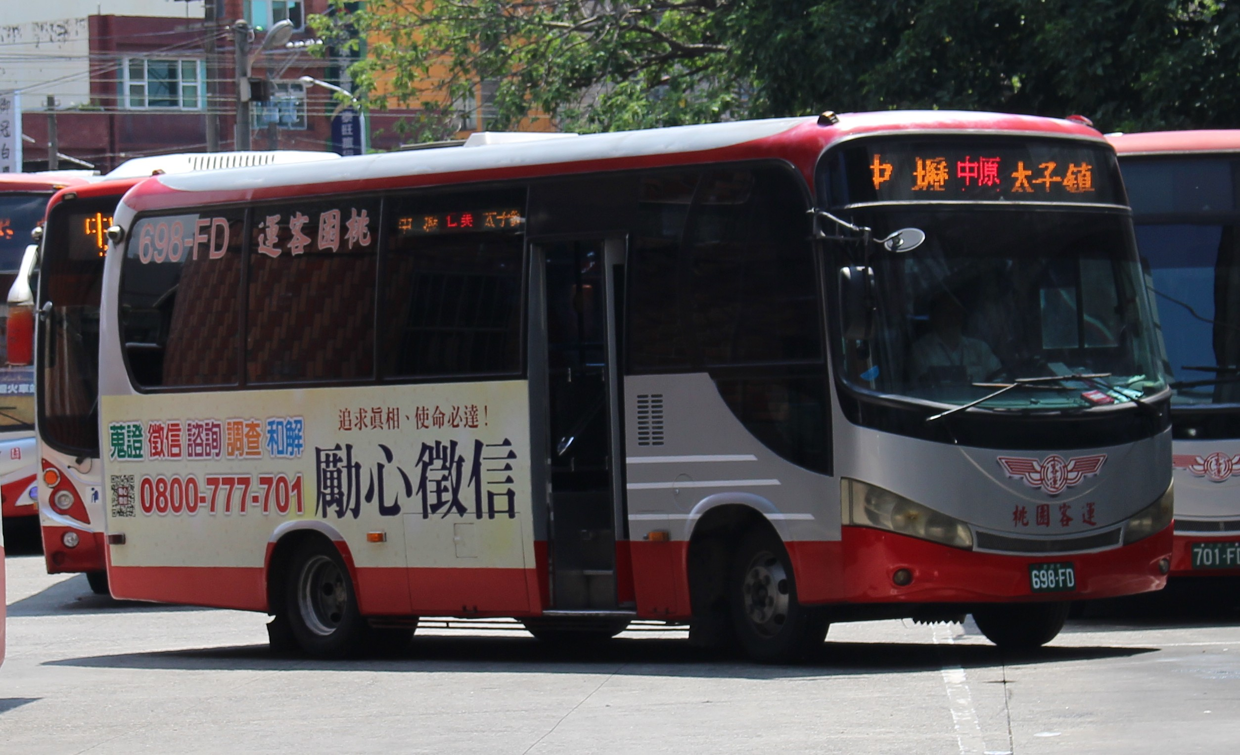 桃園客運 2005 Isuzu NQR70PBL 698-FD